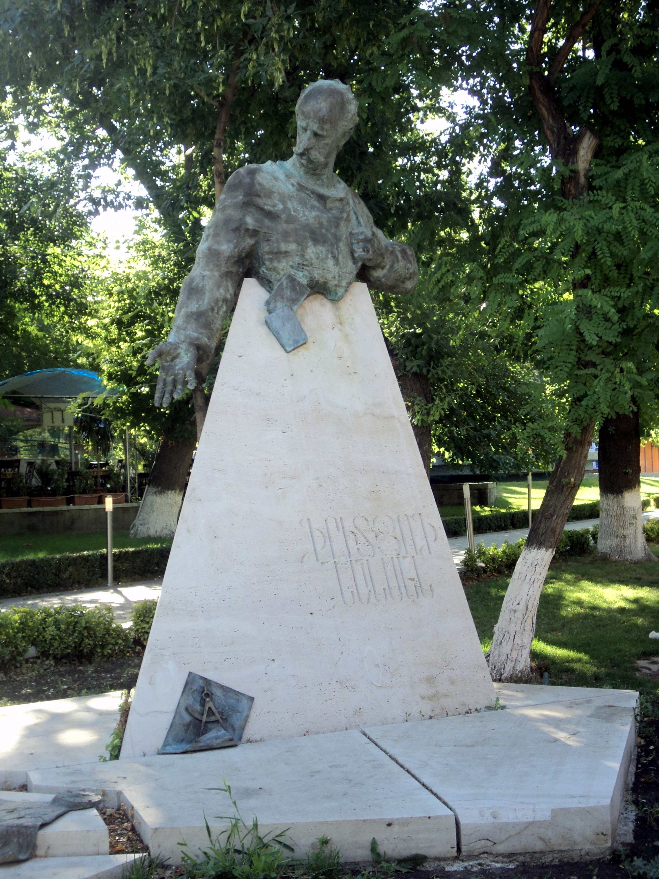 Քանդակագործ` Գարեգին Դավթյան